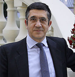 Patxi López lors d'une interview en mai 2013.